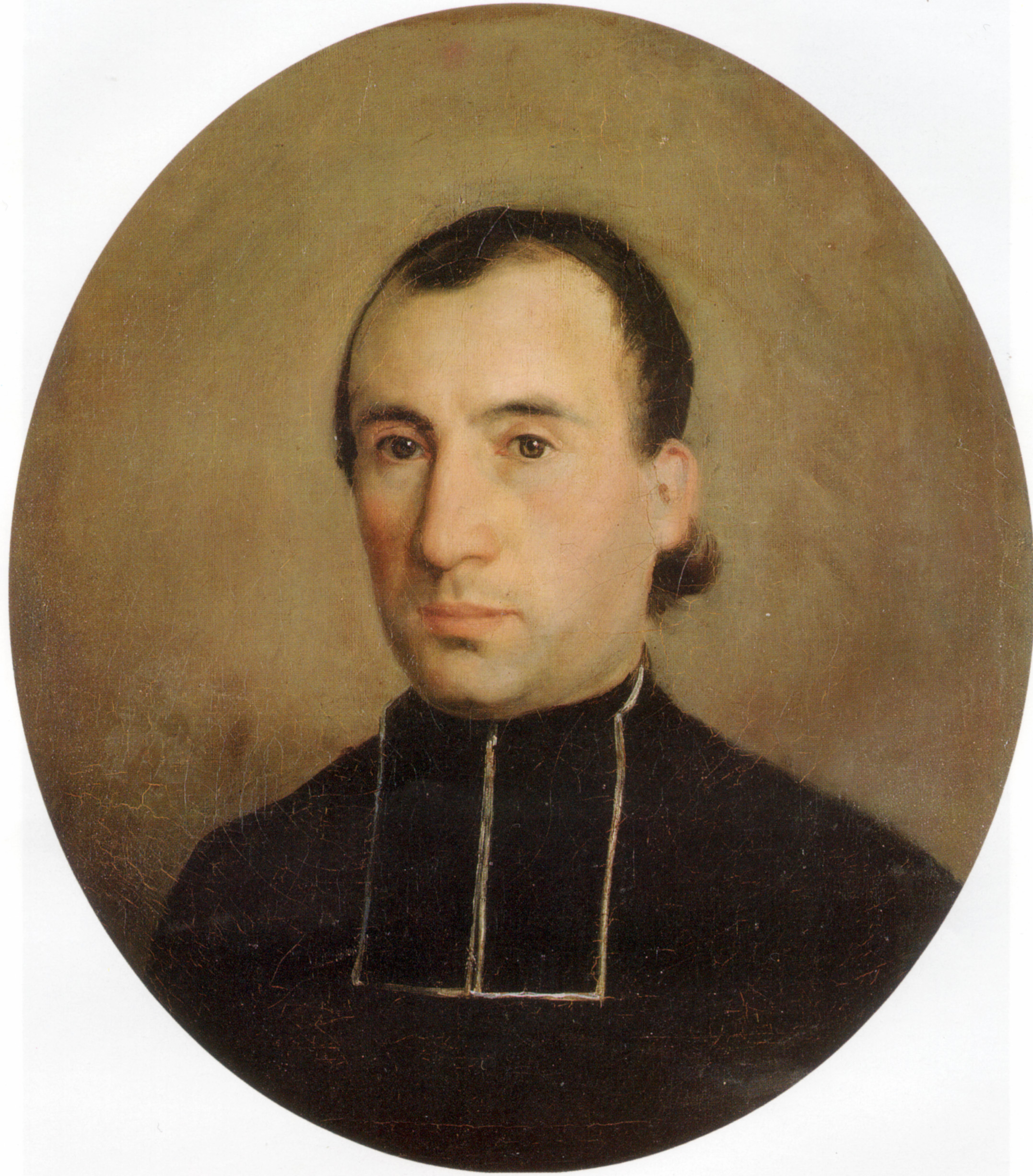 Eugène Bouguereau is the artist's uncle